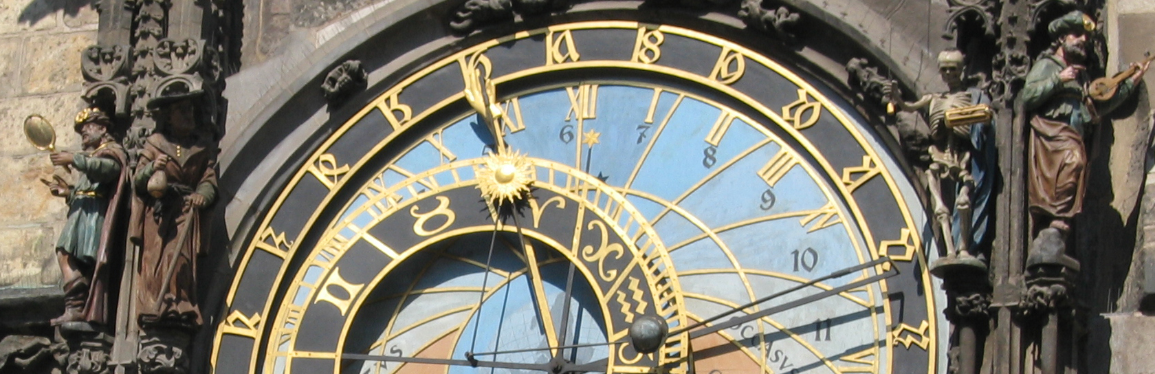 Statues ornating Orloj Astronomical Clock Font